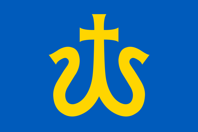 Прапор Галича